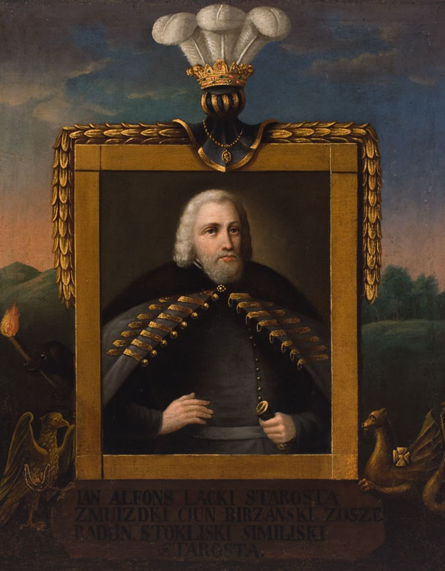 Беларуская (тарашкевіца): Партрэт Яна Альфонса Ляцкага (Jan Alfons Lacki).